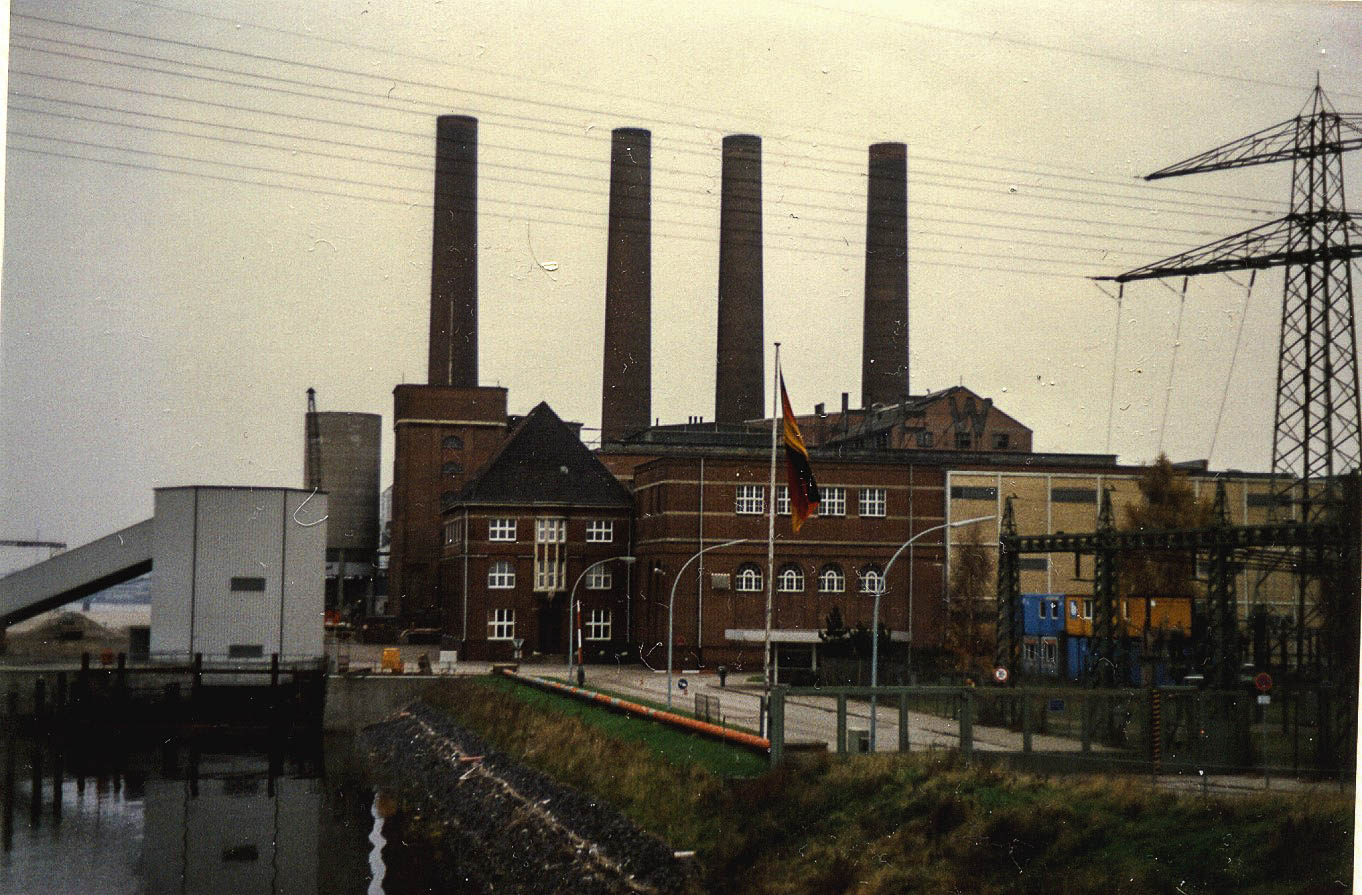 HEW-Werk Tiefstack (1986), vorne 110-kV-Umspannwerk Tiefstack